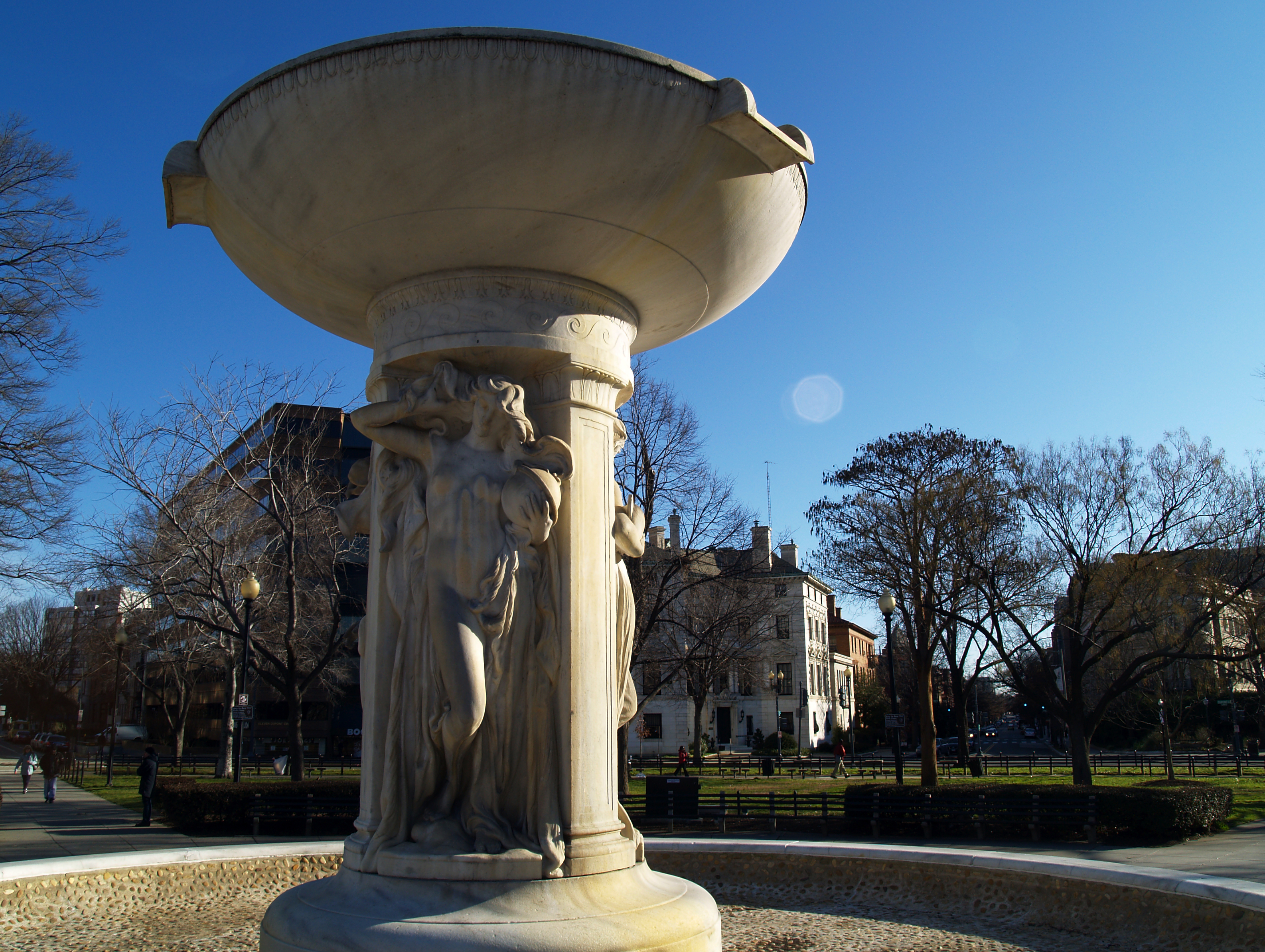 Washington. Dupont Circle fountain.